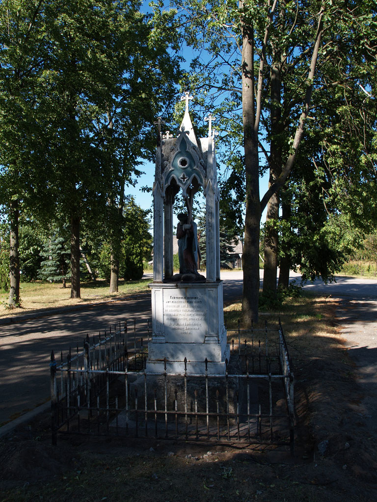 Anciškio paminklas